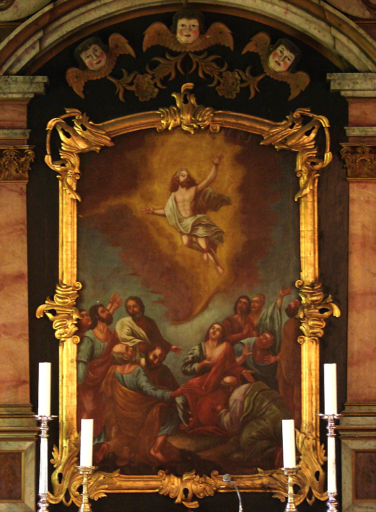 Himmelfartsbillede fra altertavle i Solum Kirke, trolig inspireret af Hendrik Krock (1671-1738), Telemark